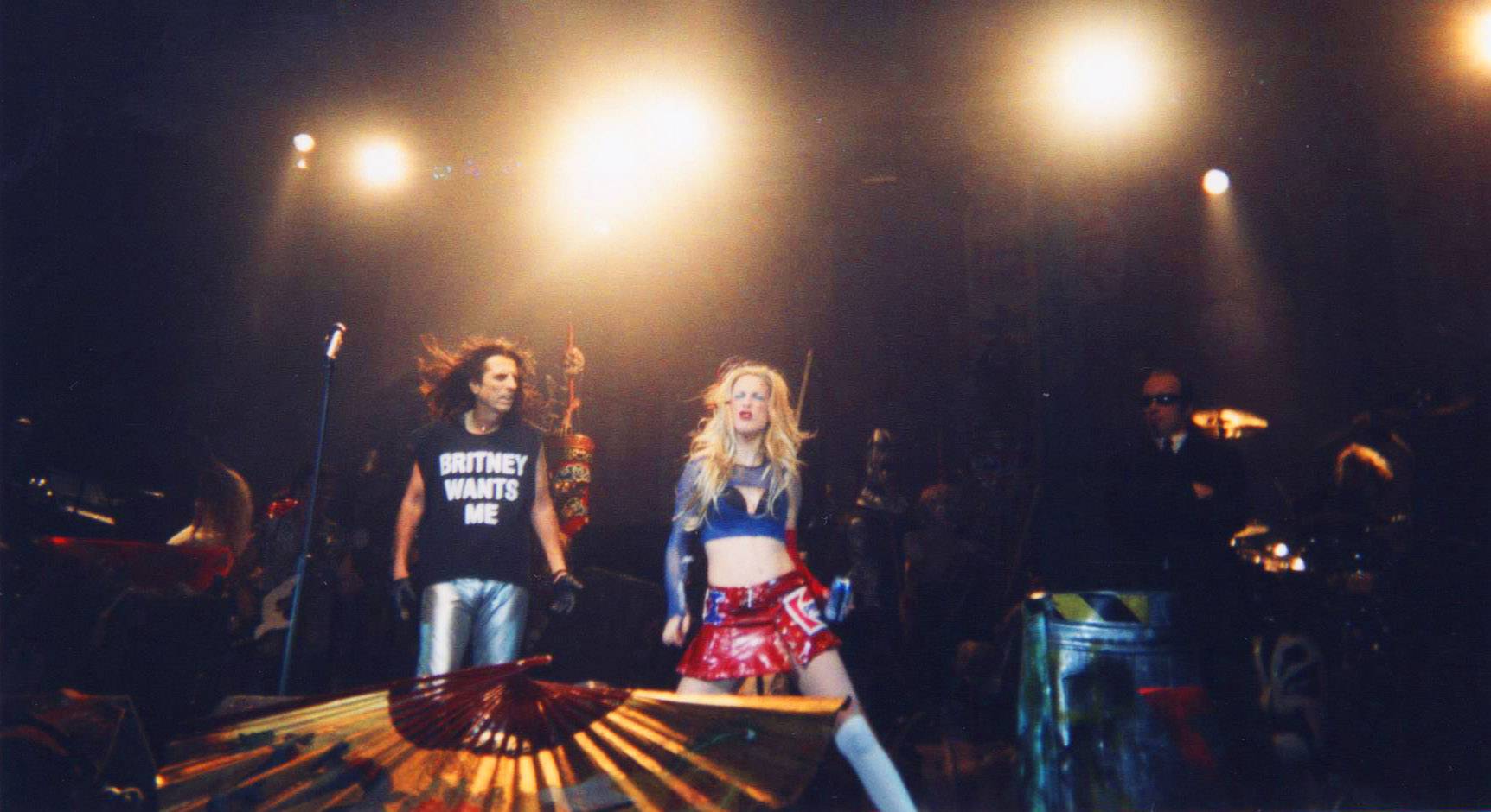 Alice avec sa fille Calico,au Zénith de Paris le 13 avril 2002